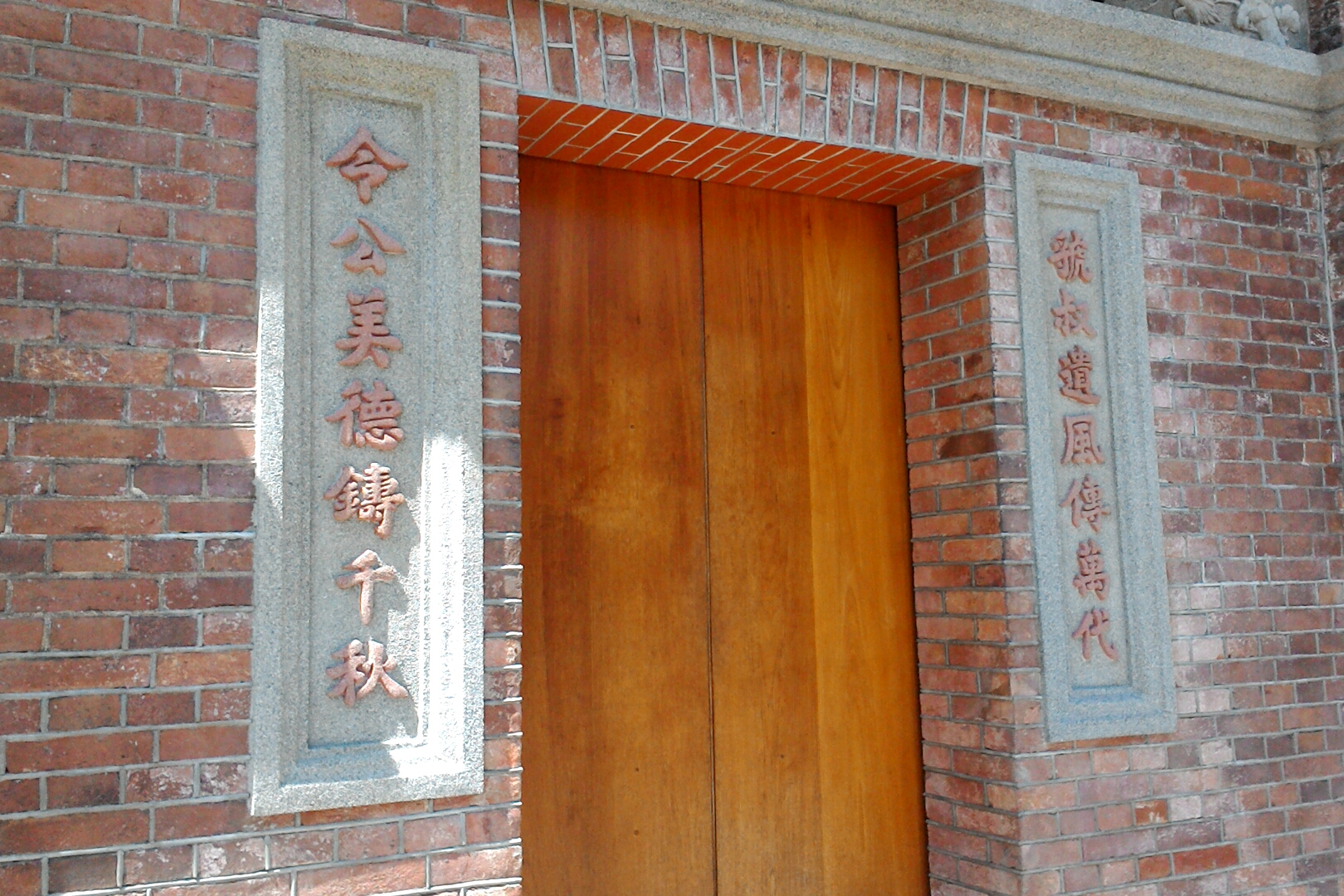 內湖郭氏古宅對聯,台北市內湖區紫陽次分區紫陽里